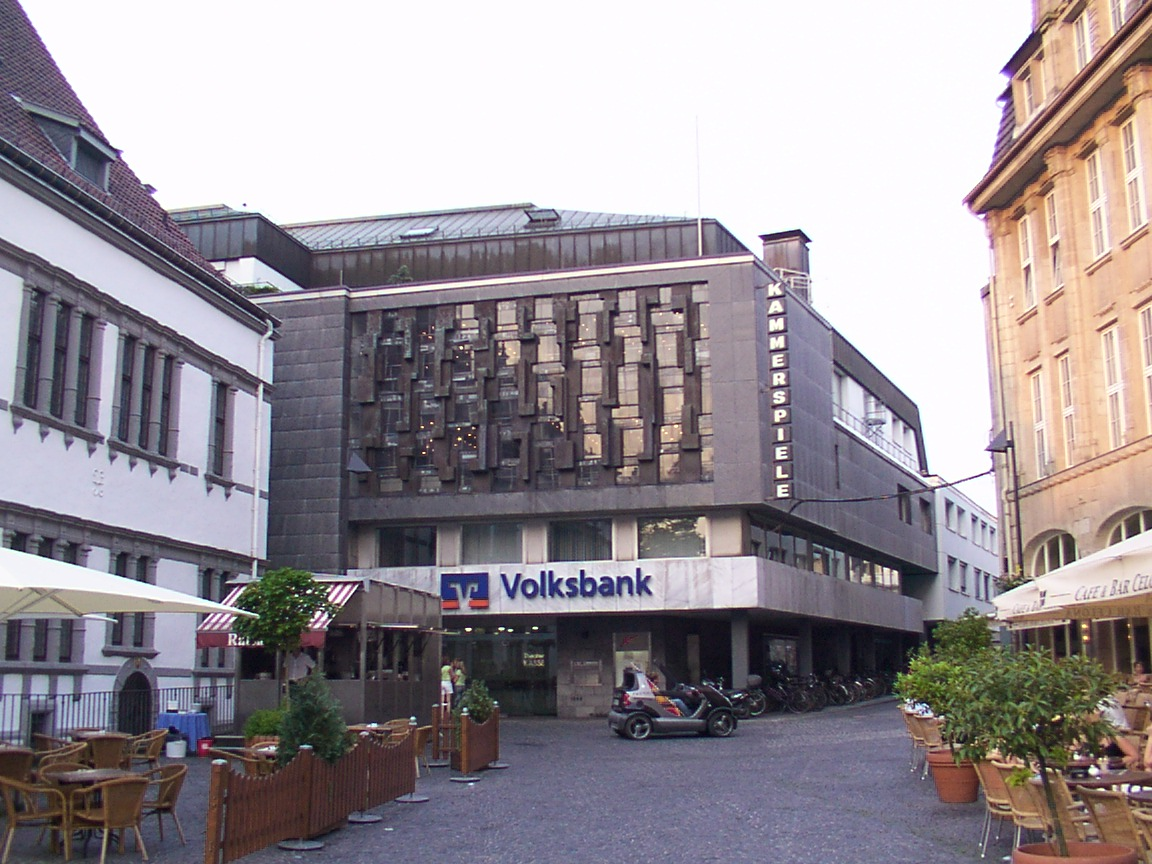 Paderborn: Volksbank Paderborn-Höxter-Detmold, Hauptstelle Paderborn, mit den Westfälischen Kammerspielen, Eingang vom Kötterhagen